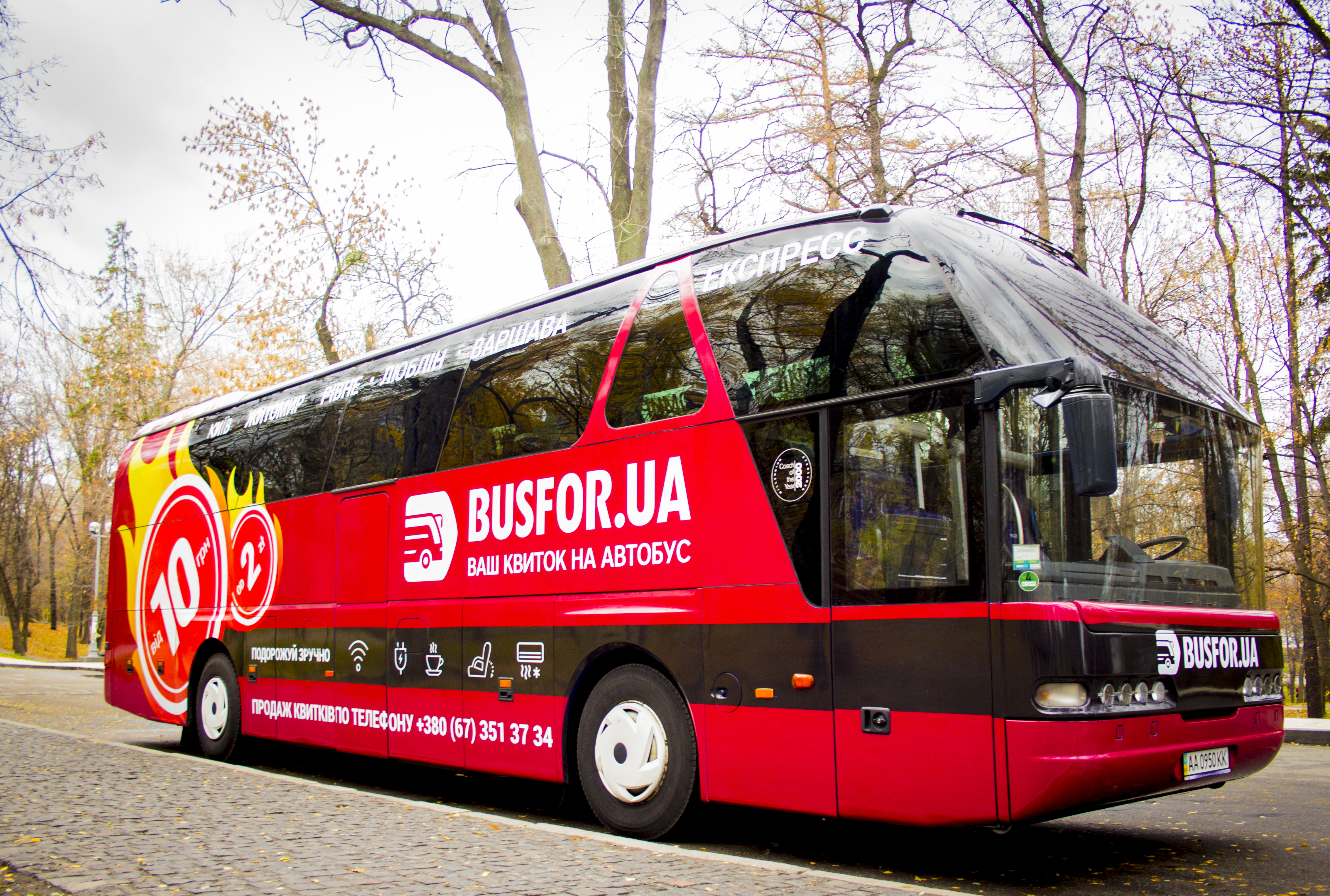 Автобус здійснює регулярні рейси за маршрутом Київ - Варшава - Київ